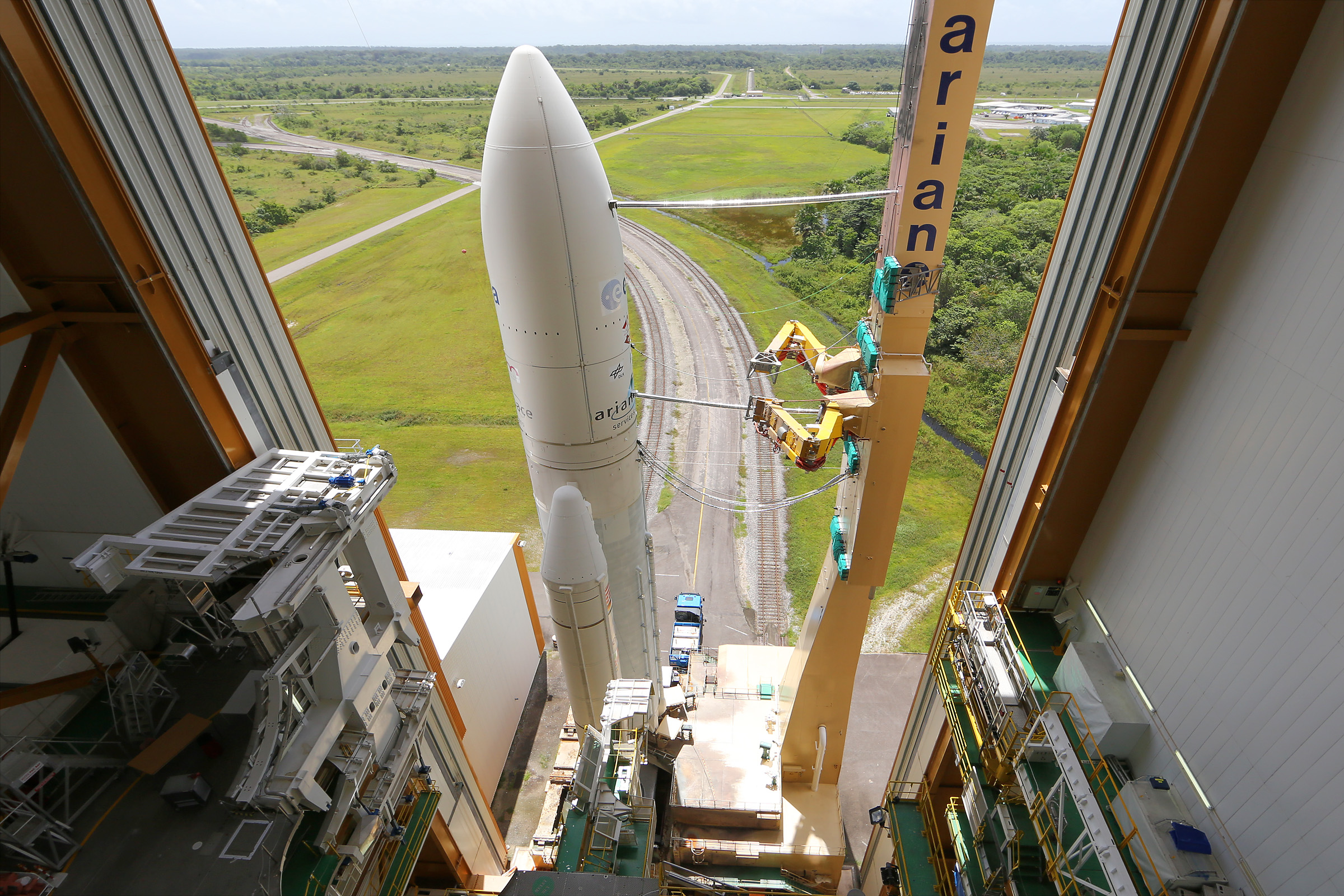 Raumfrachter ATV-4 "Albert Einstein" Ariane 5ES mit "OCAM"-Kamerasystem Gemeinsam mit Partnern hat das DLR in den vergangenen Jahren das On-Board-Kamerasystem "OCAM" entwickeln lassen, mit dem sich der Flug der Ariane-Rakete verfolgen lässt. Das OCAM-System ist eine eigenständige Komponente, die auf der Ariane 5 als Passagier mitfliegt. Der Höhepunkt des OCAM-Einsatzes wird die Beobachtung des Absetzens von ATV-4 im Orbit sein. Für dieses Ereignis wird OCAM dreidimensionale Video-Sequenzen aufnehmen, um das dynamische Verhalten der Raumfahrzeuge während der Separationsphase zu studieren. Damit eröffnet sich für die Ingenieure des ATV-Projekts eine völlig neue Möglichkeit, den Erfolg ihrer Arbeit zu beobachten und zugleich für die Zukunft wichtige neue Erfahrungen zu sammeln. Credit: DLR/Thilo Kranz (CC-BY 3.0) 2013